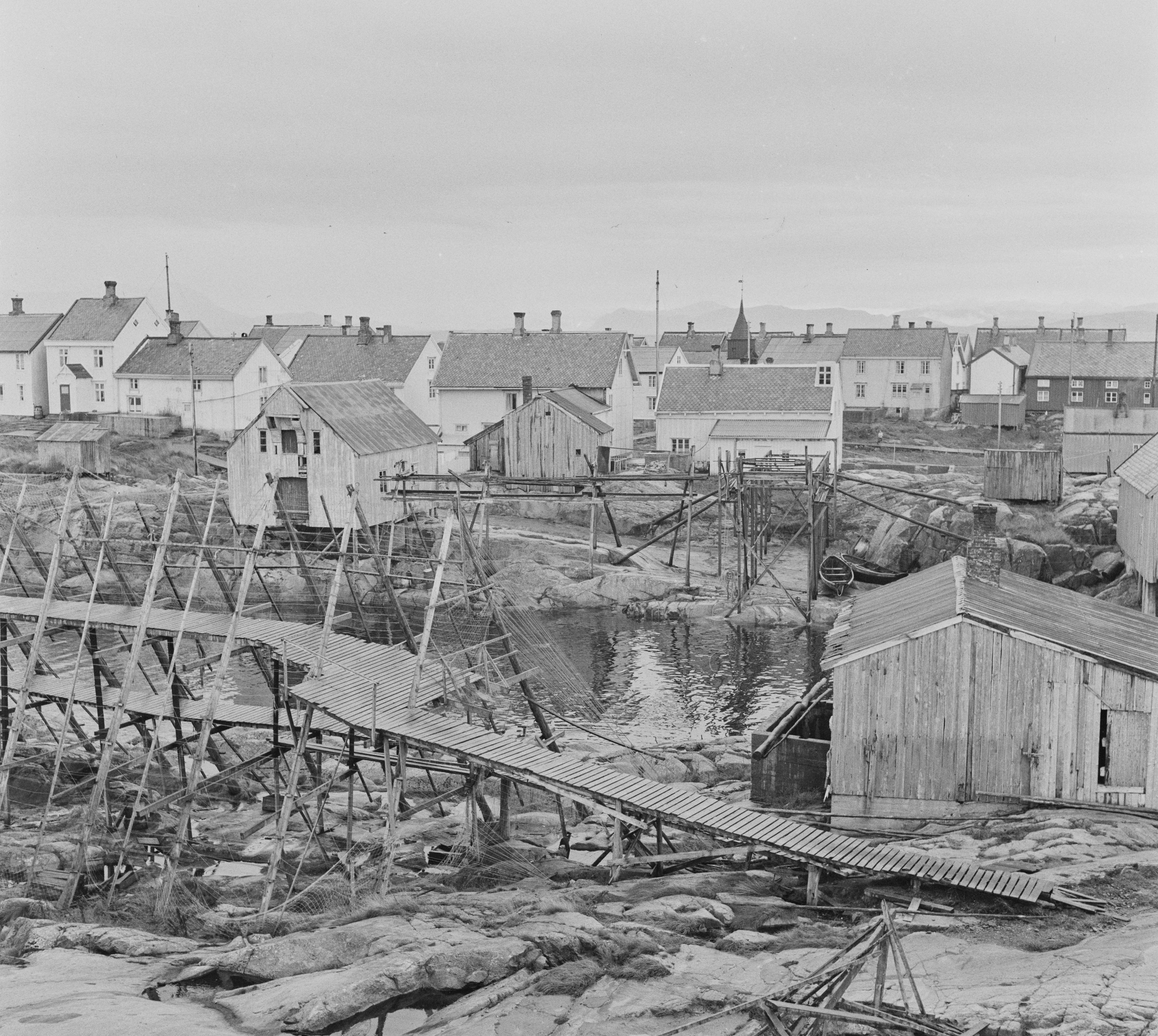 Bildet er hentet fra Arkivverket. Grip. Valg i Norges minste kommune. NÅ nr. 41, 1955. Arkivinstitusjon : Riksarkivet Arkivnavn : Billedbladet NÅ Sted : Norge, Møre og Romsdal, Kristiansund, Grip Avbildet